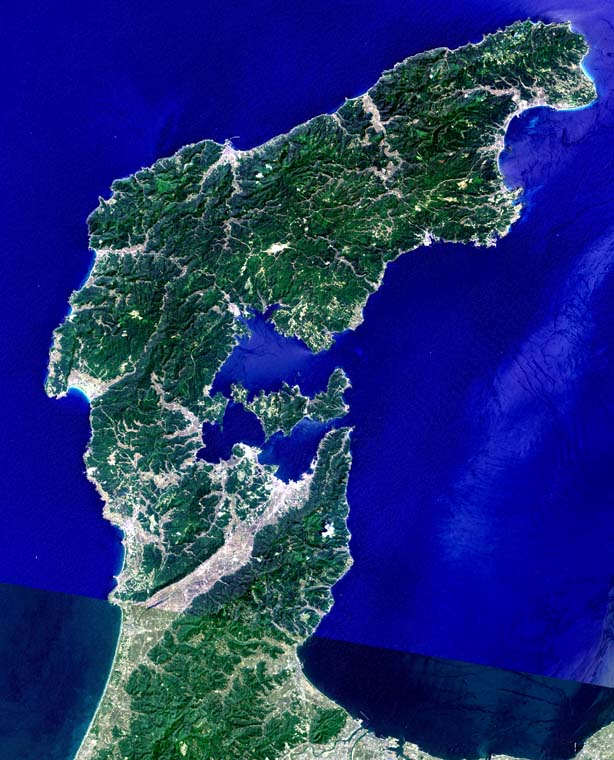 Noto Peninsula, Ishikawa, Japan.